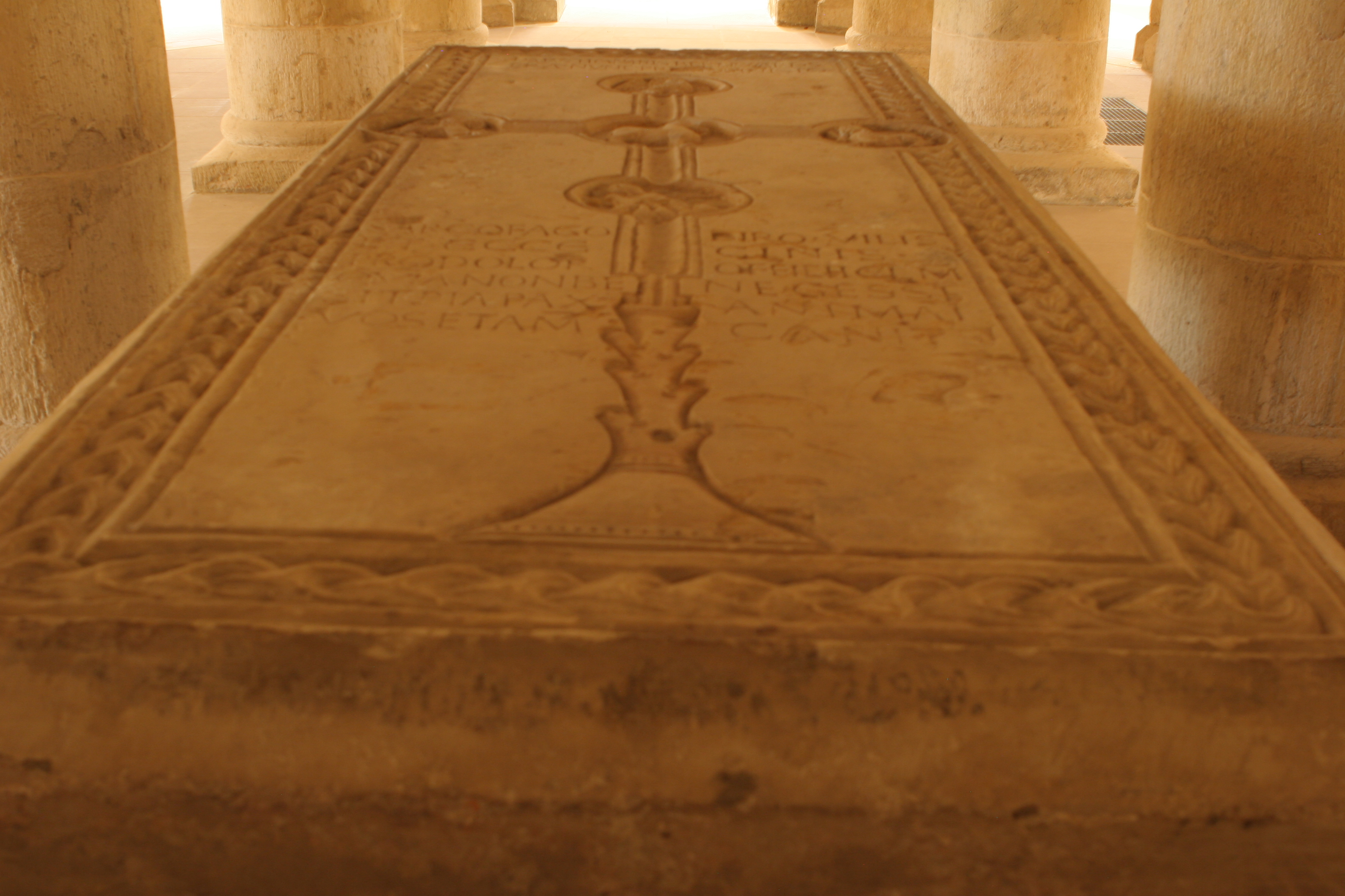 (ältere)Grabplatte von Bernward von Hildesheim in der Krypta der Hildesheimer Michaeliskirche